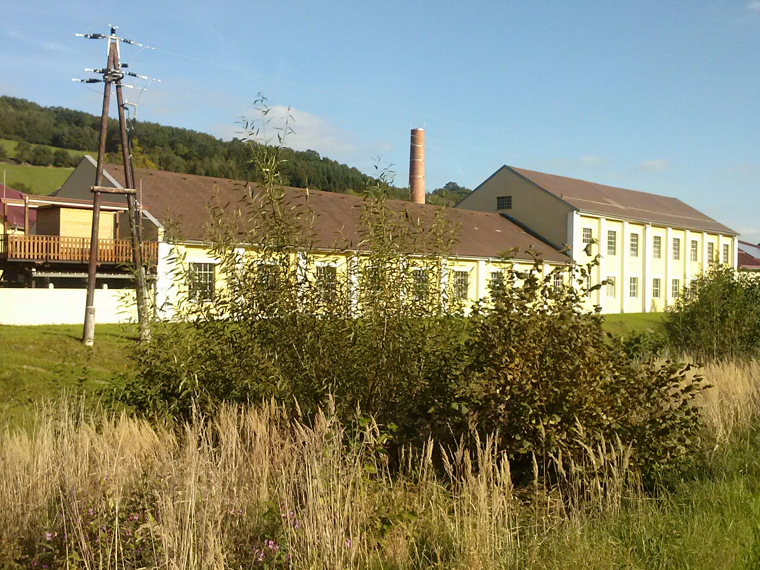 Firma Meisterfrost in Sinnersdorf.